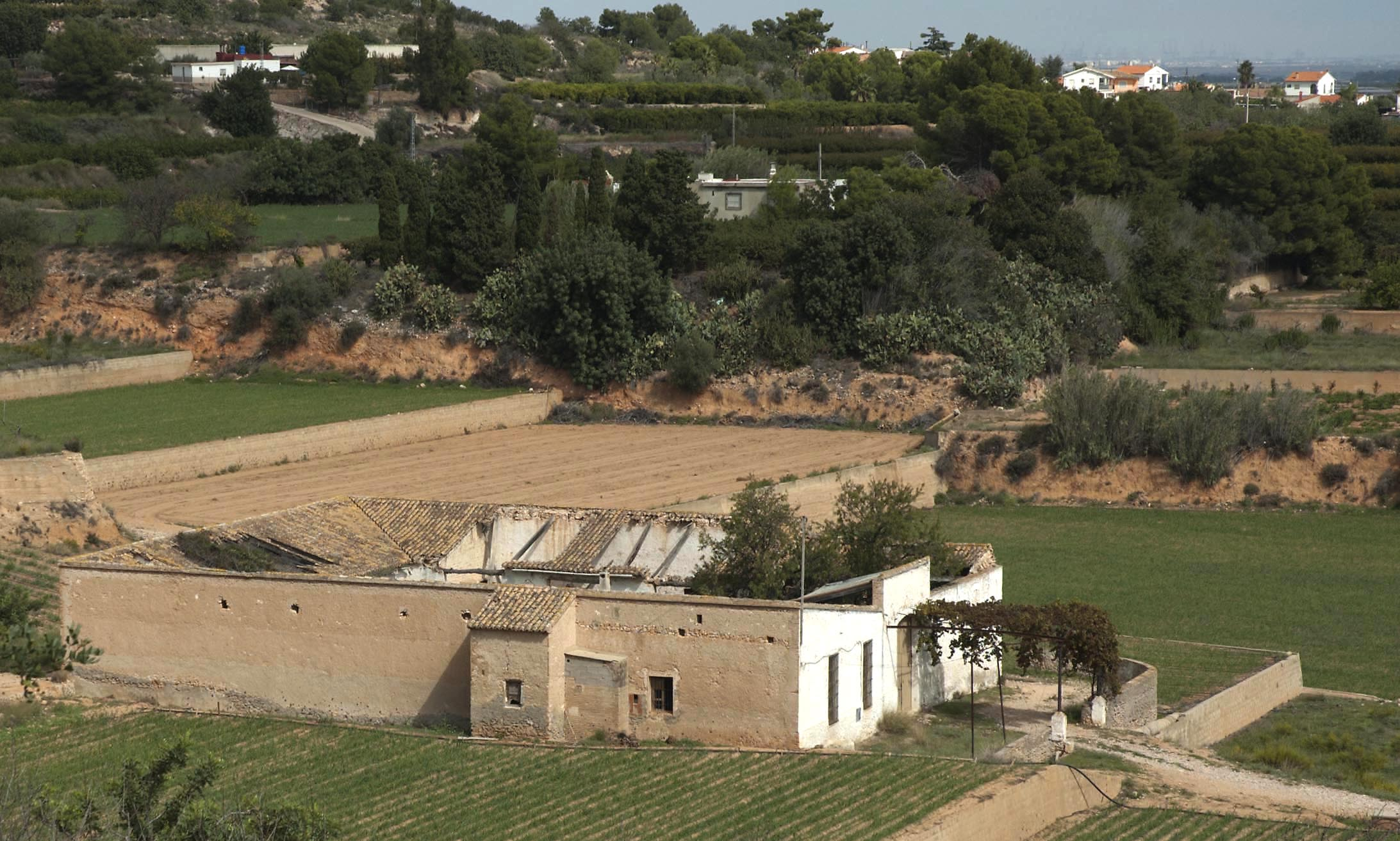 Partida del Corralot a la zona muntanyosa del municipi. Encara queden oliveres i garrofers. Fotografia publicada en: Agenda Cultural Febrer 2019, Ajuntament d'Alginet-Regidoria de Cultura